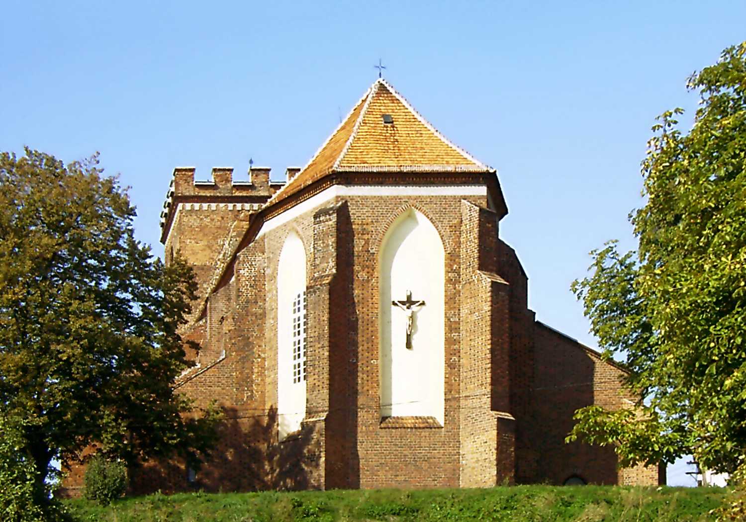 Pyzdry, kościół farny